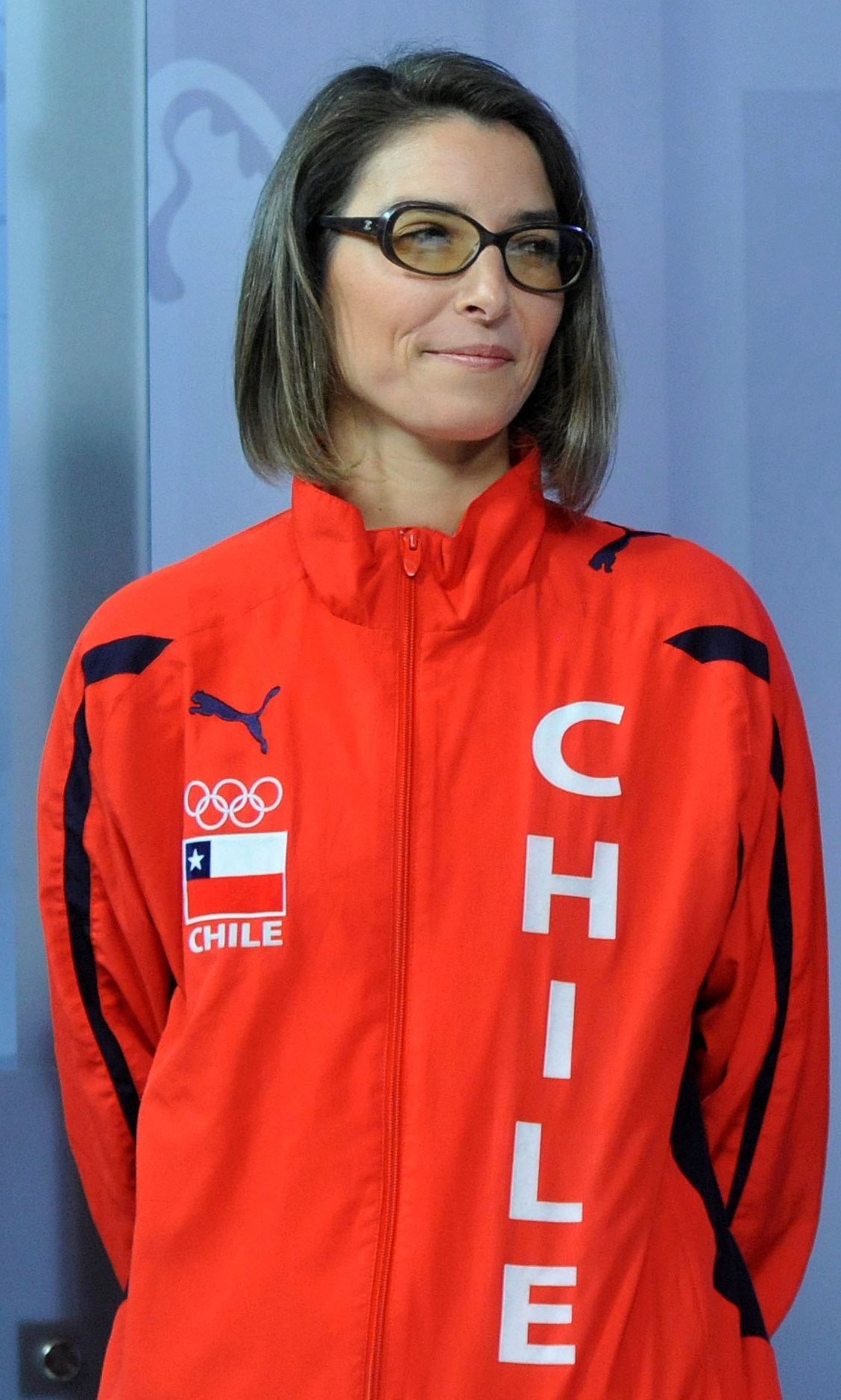 Cáterin Bravo, esgrimista chilena.